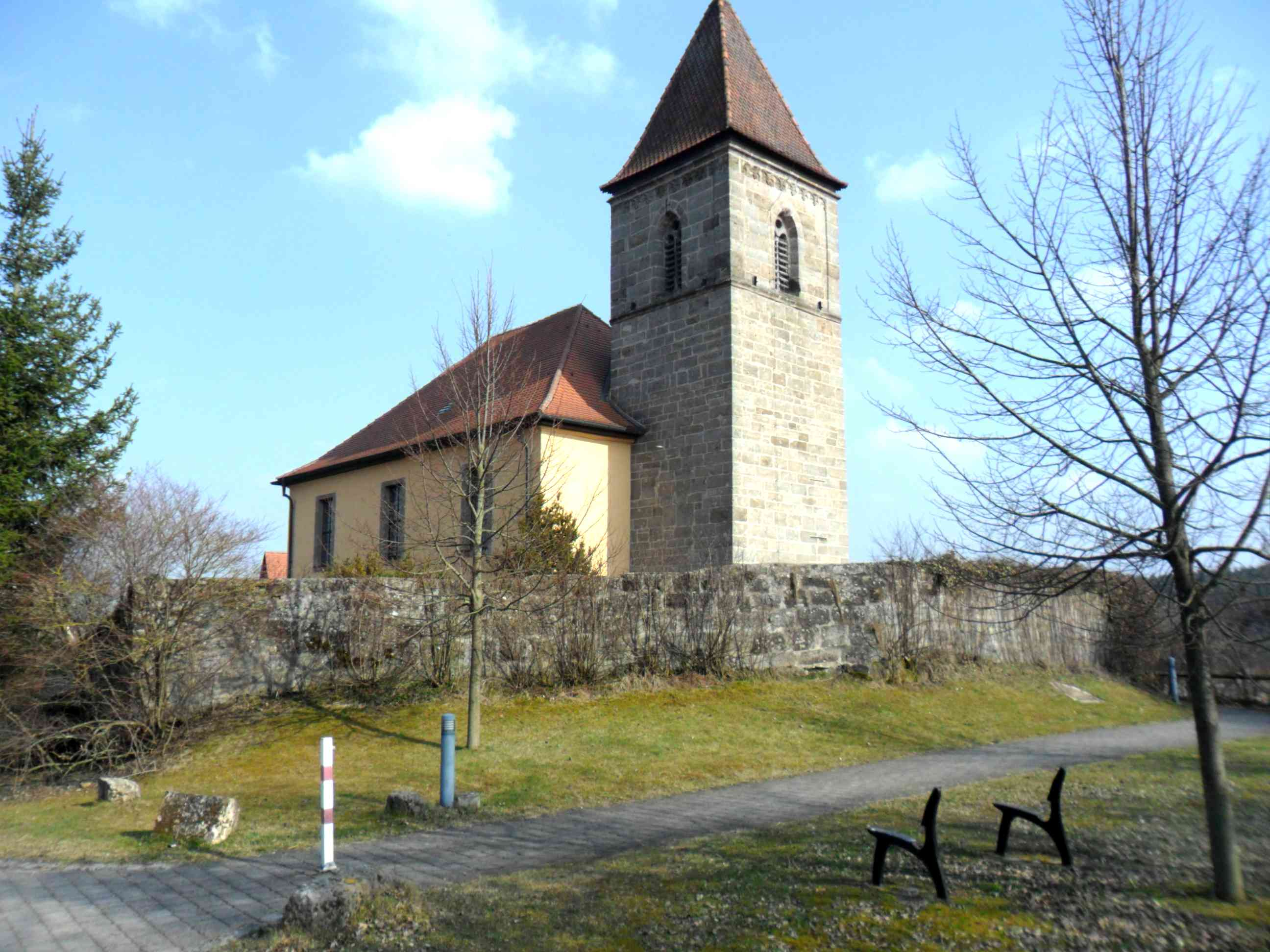 Vincenzenbronn-Ansicht von Nordwesten mit Kirche über Kirchhofmauer-23022012